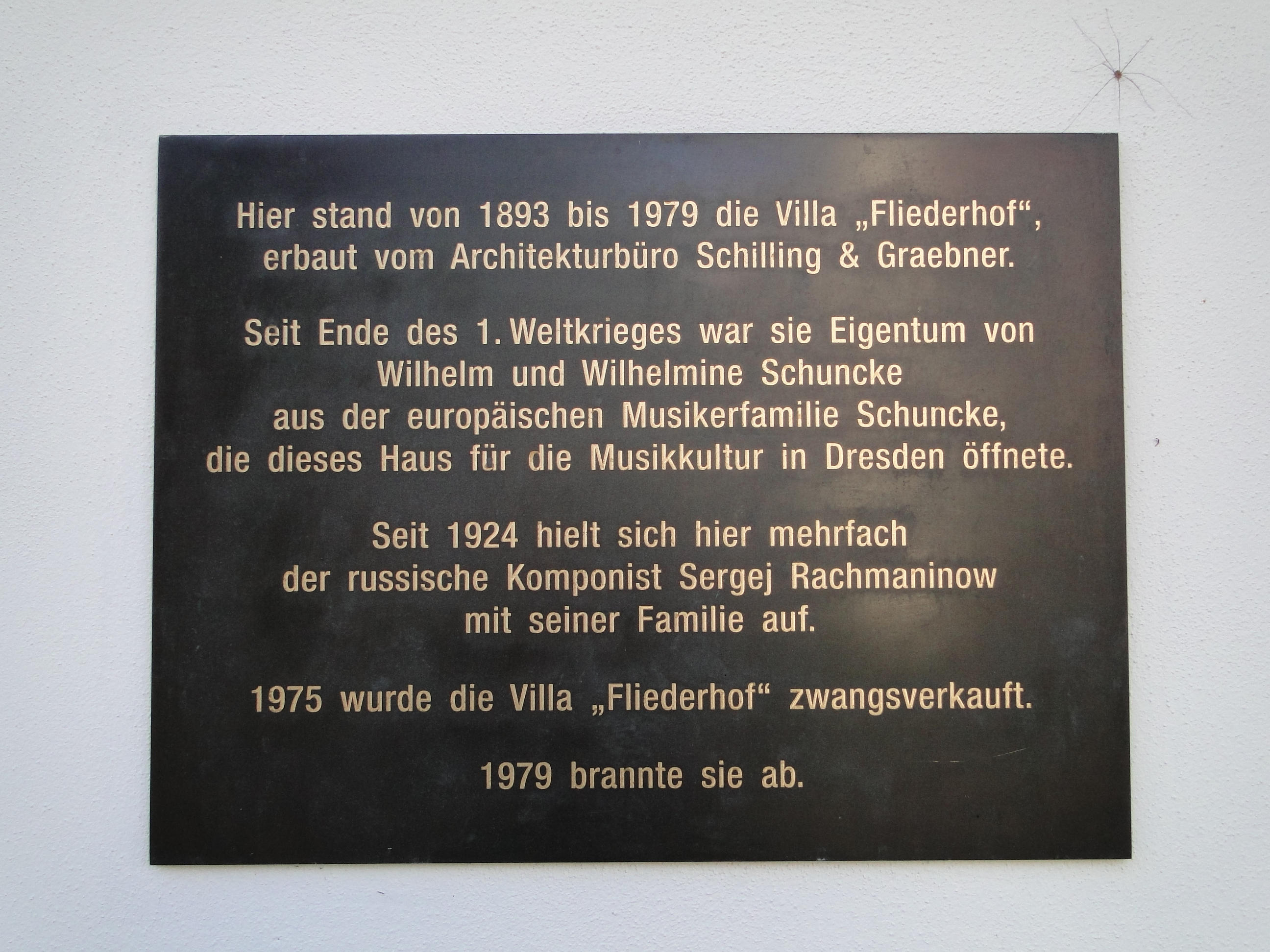 Gedenktafel für die Villa Fliederhof an der Grundstücksmauer Goetheallee 26 in Dresden